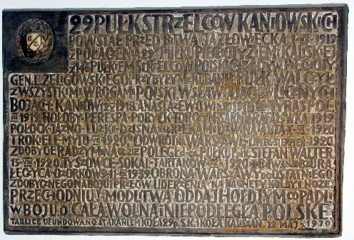 Tablica w kościele św. Andrzeja Boboli w Londynie